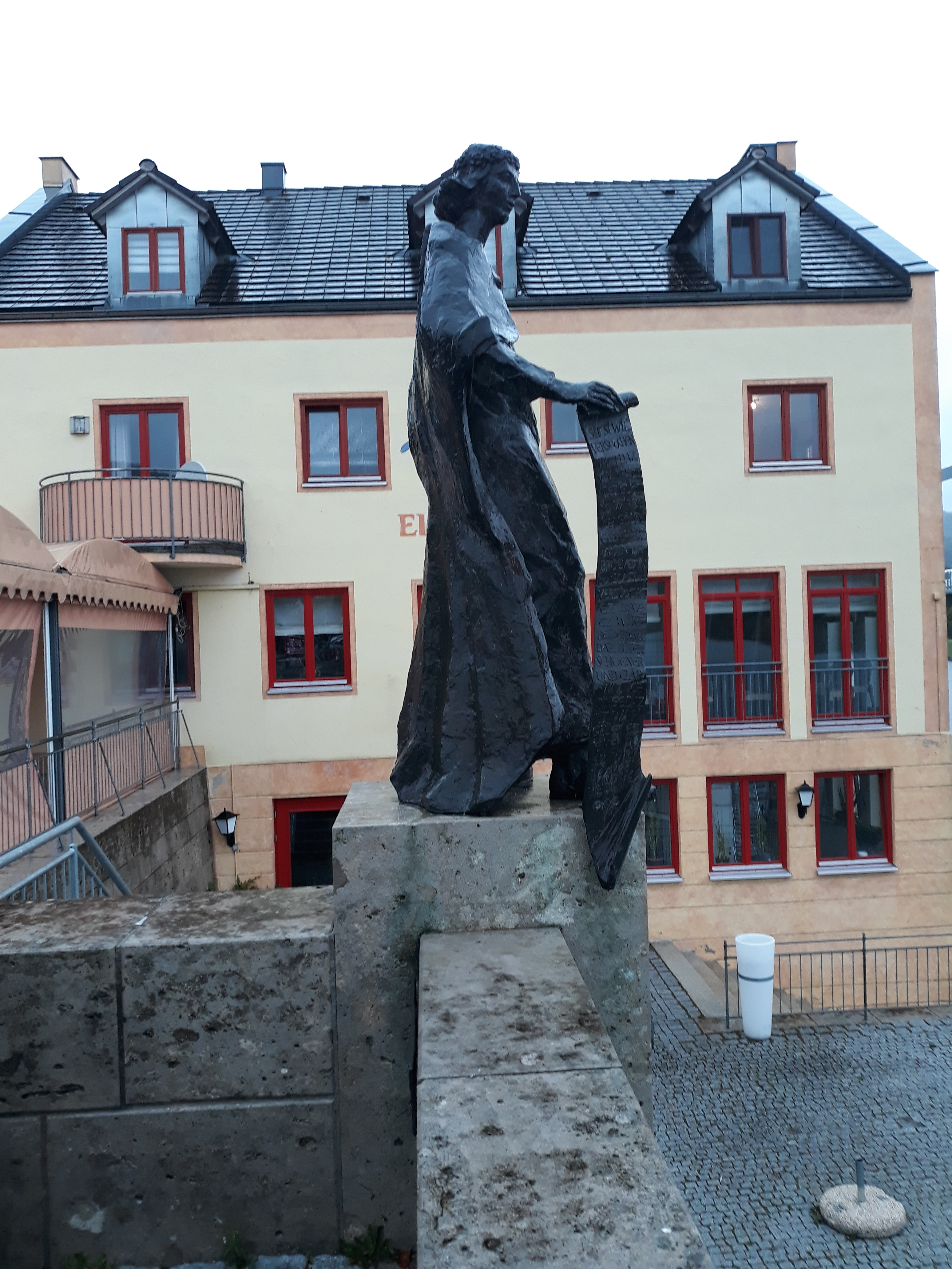 Das Denkmal des deutschen Minnesängers Heinrich von Riedenburg in Riedenburg (Niederbayern).